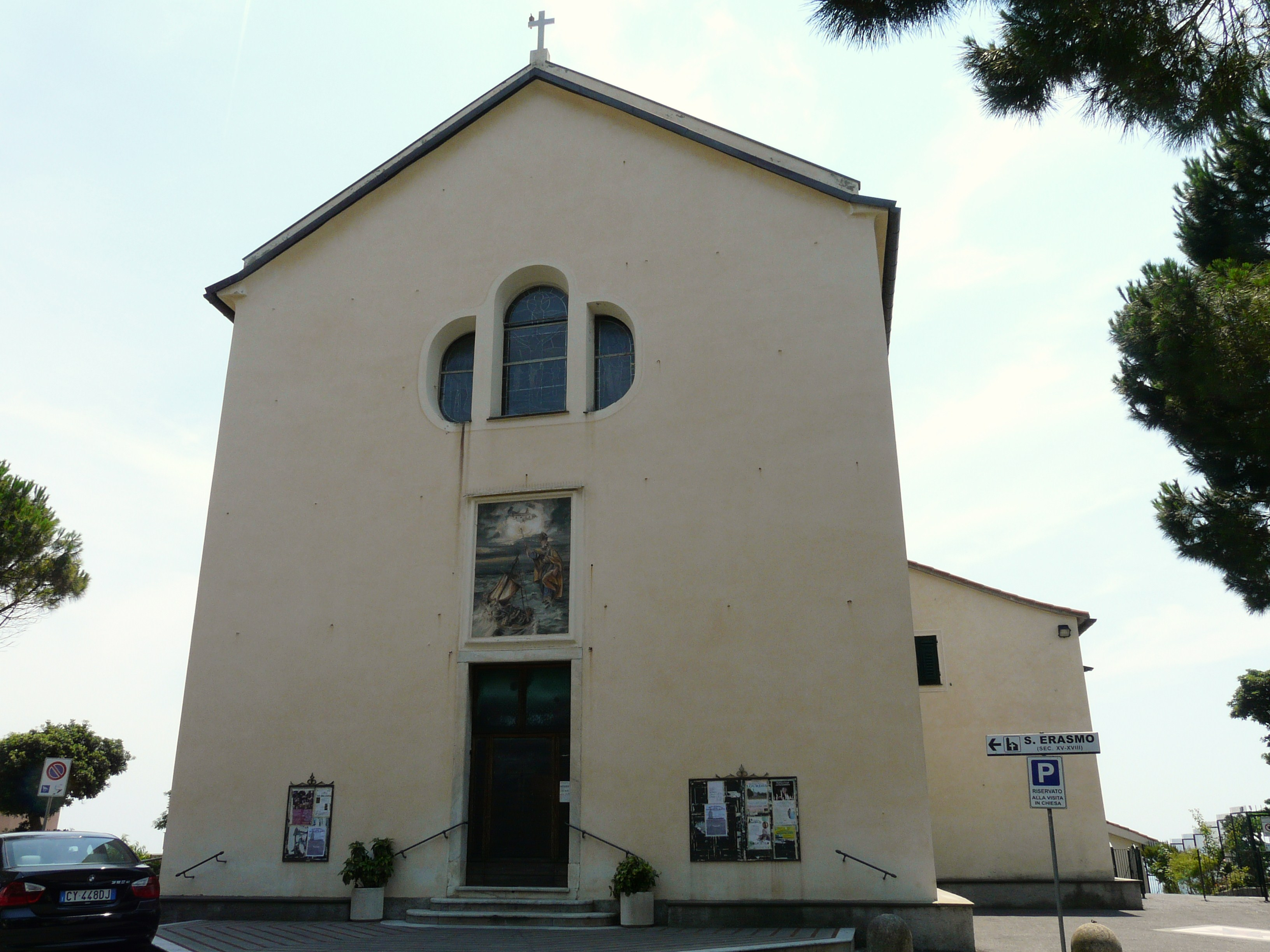 Chiesa di Sant'Erasmo, Quinto al Mare, Genova, Liguria, Italia